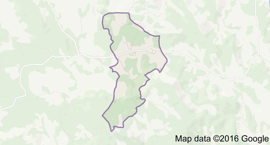 Peta Majalangu Raya